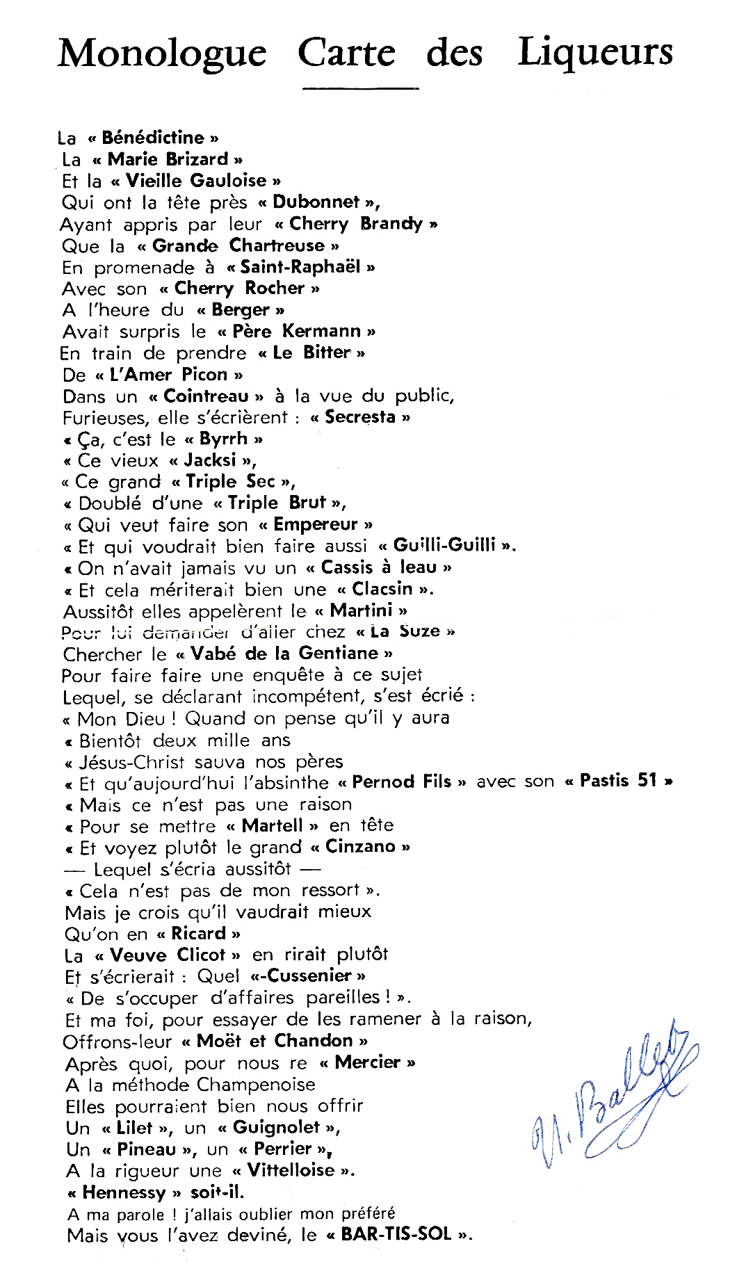 Template:Monologue Ulysse Ballet - Archives Gilliard